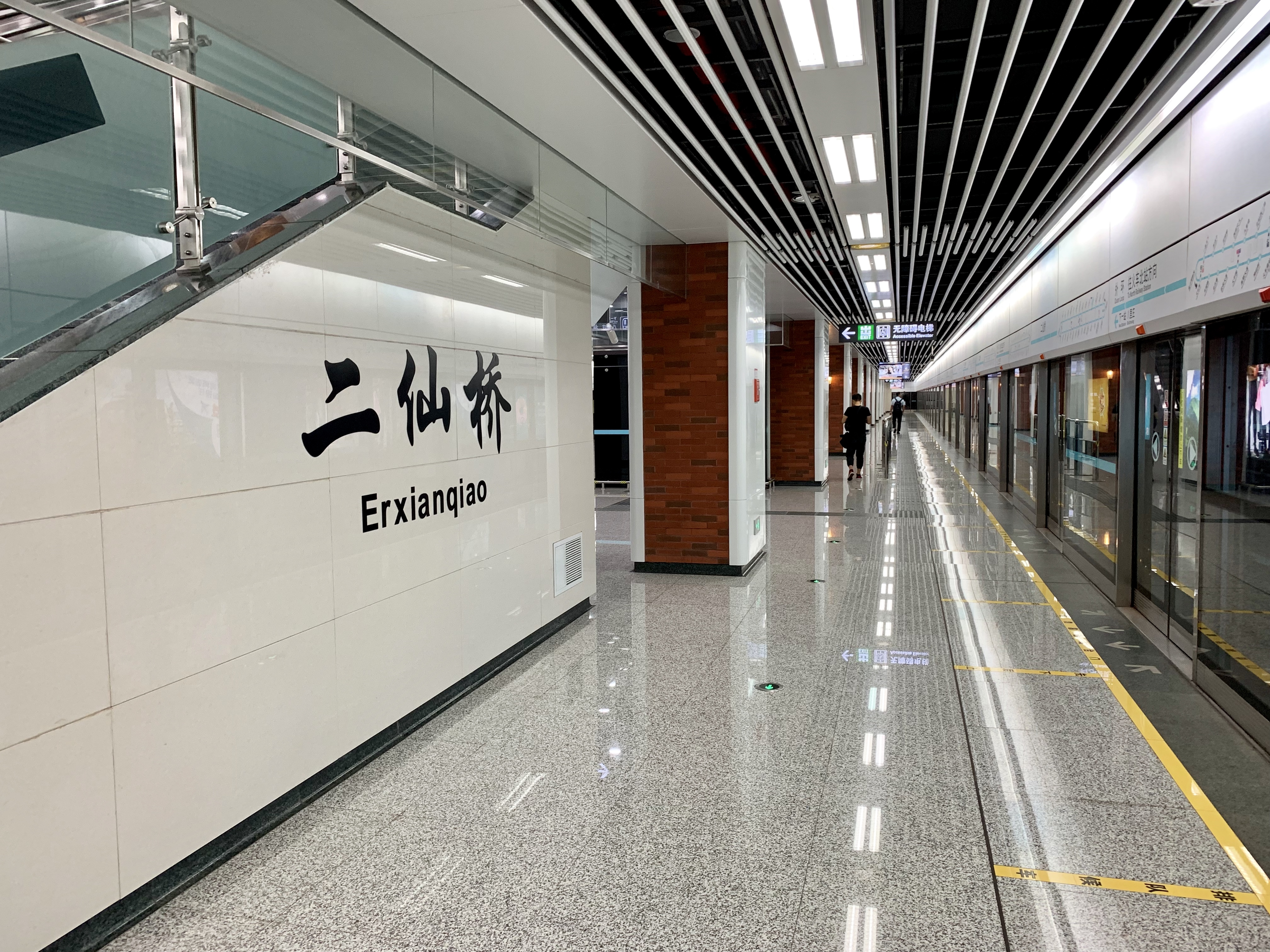 成都地铁二仙桥站